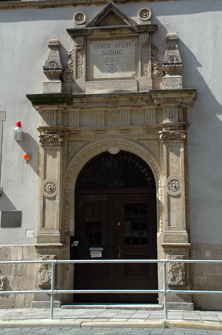 Hauptportal der Edith-Stein-Schule, in der Trommssdorffstraße in Erfurt